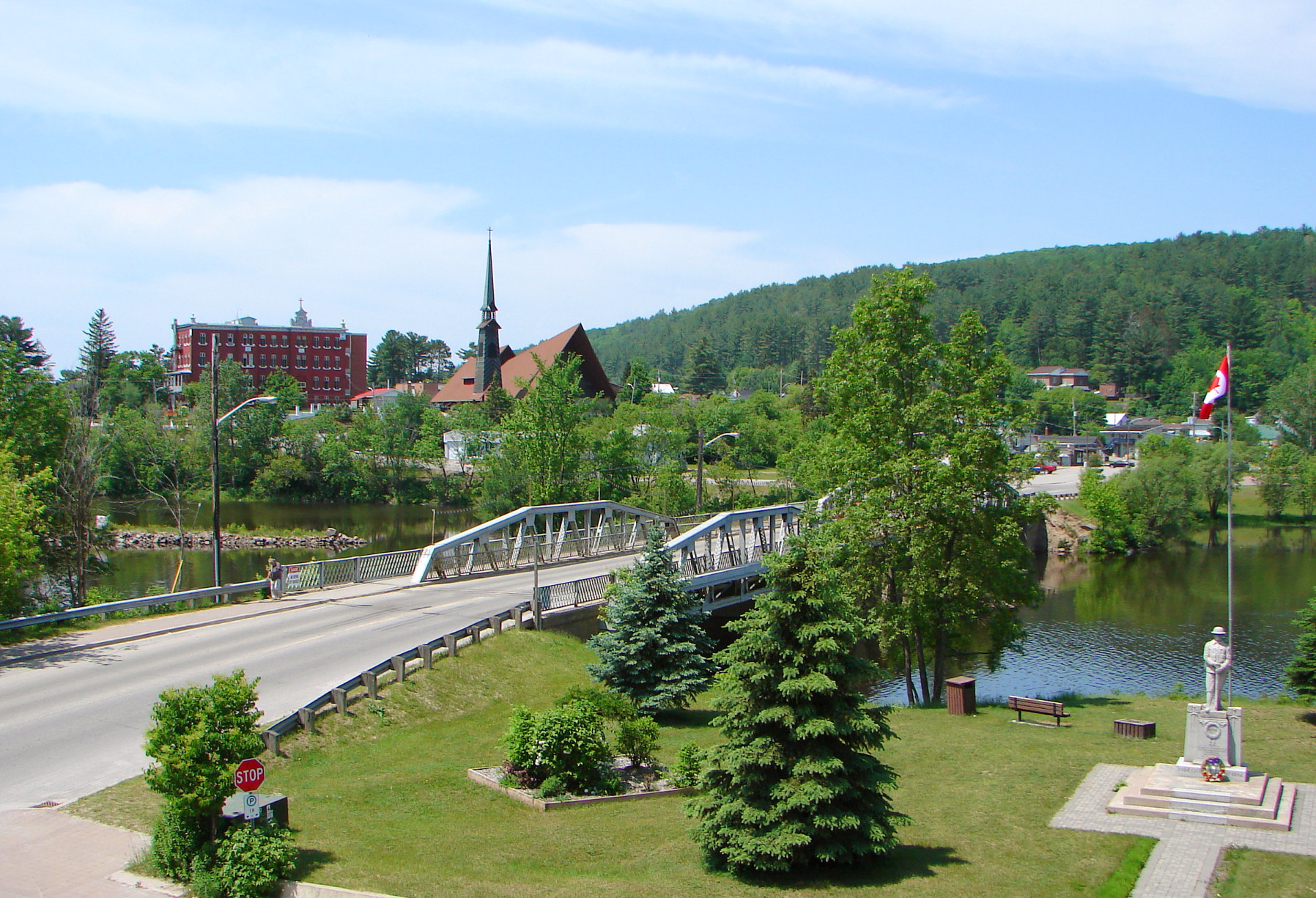 Mattawa, Ontario, Canada